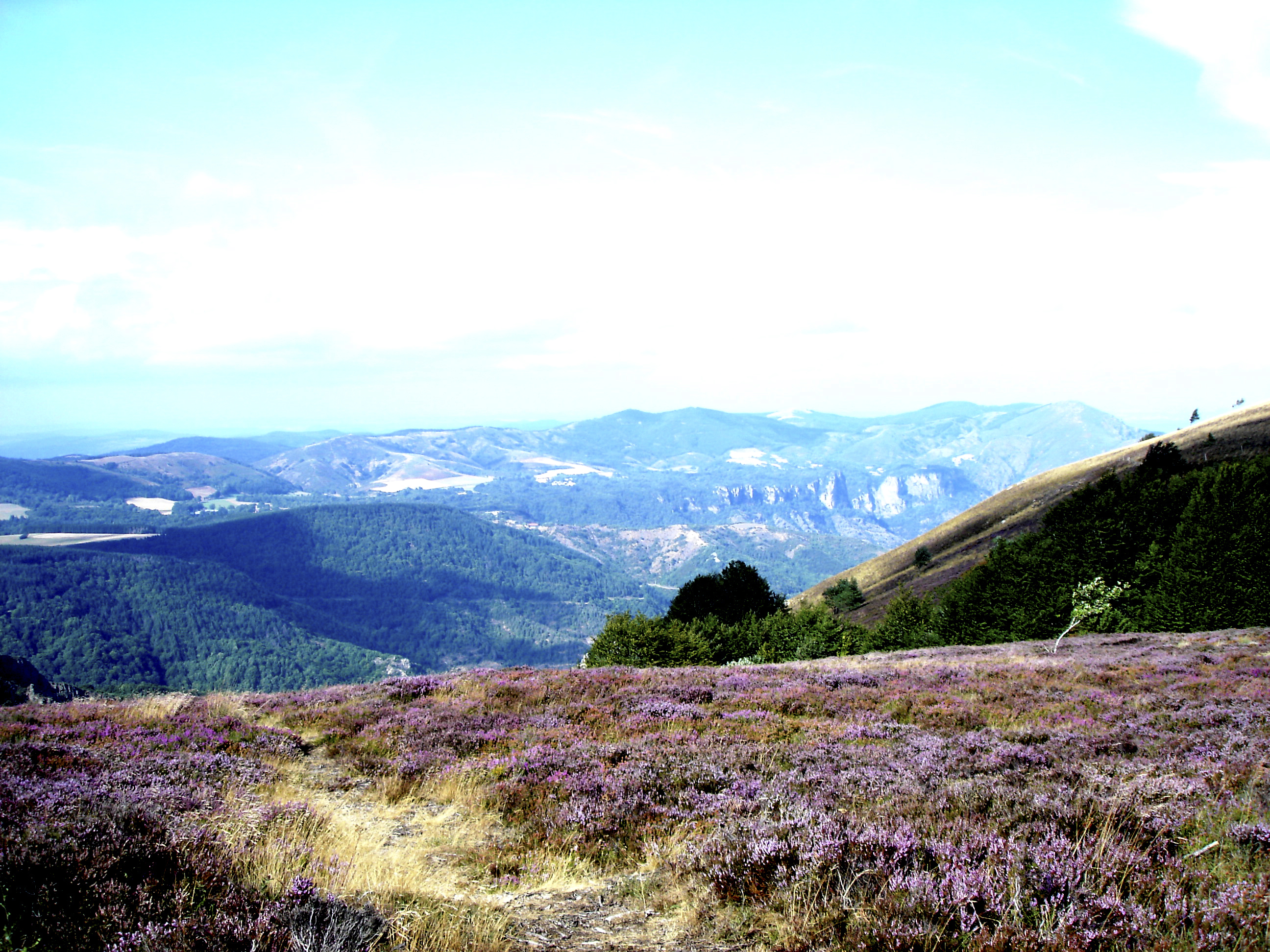 Espinouse - Voir au loin à droite Les Falaises d'Olques et le Mont Marcou (1093 m)